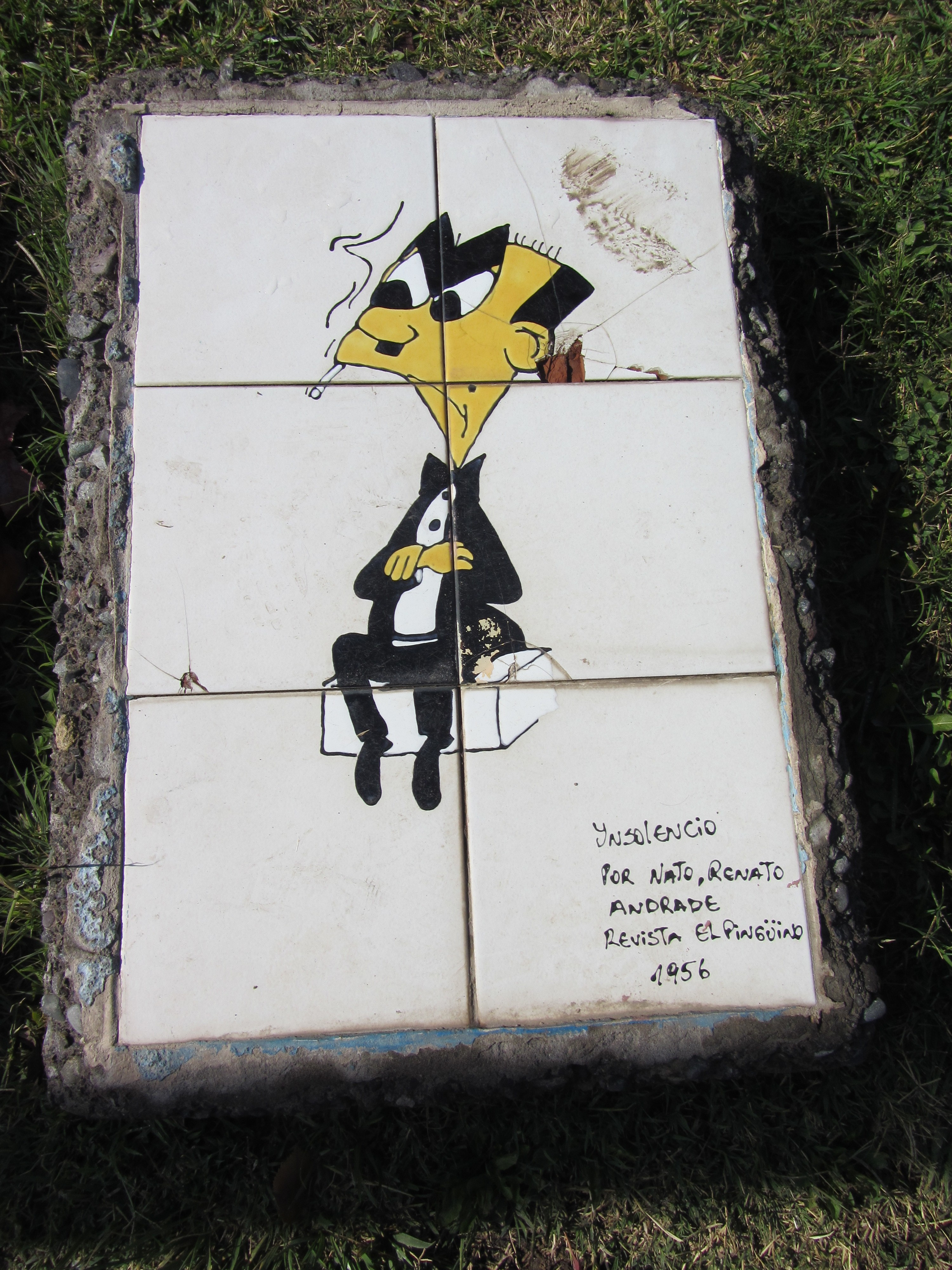 Parque del Cómic